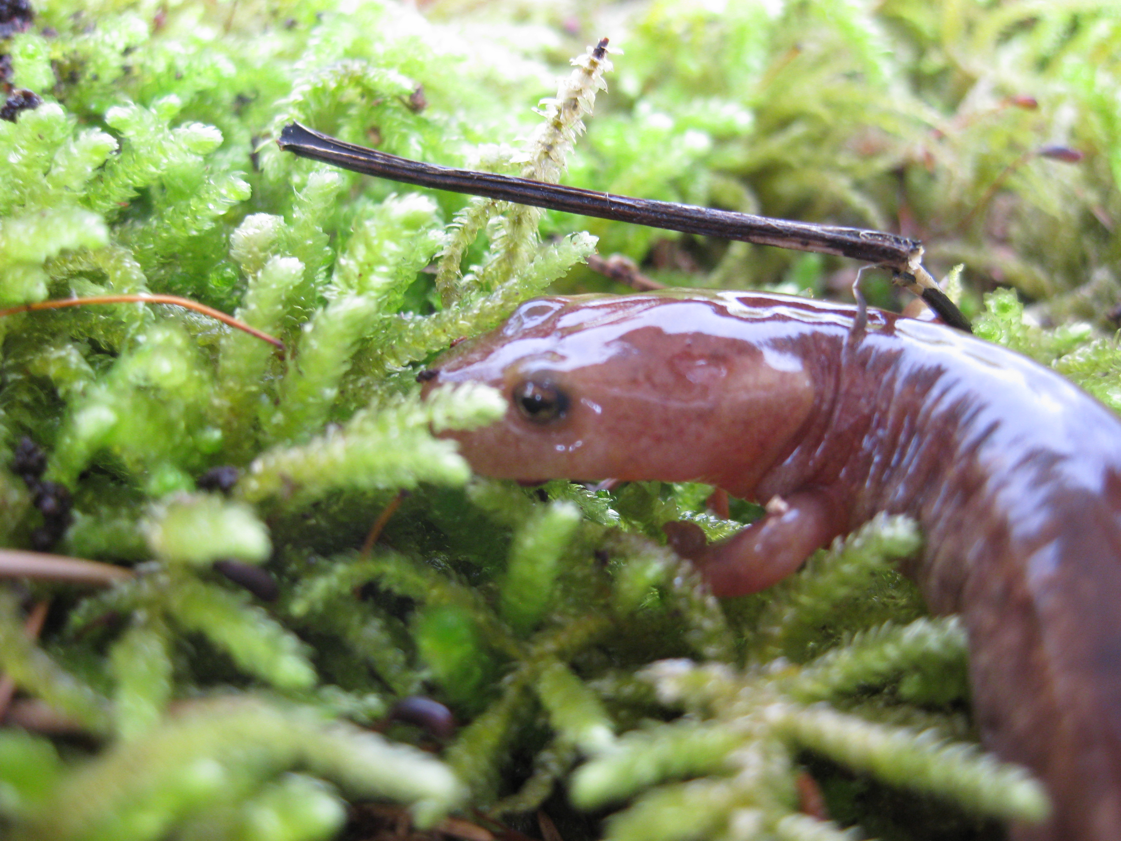 Pachytriton sp.